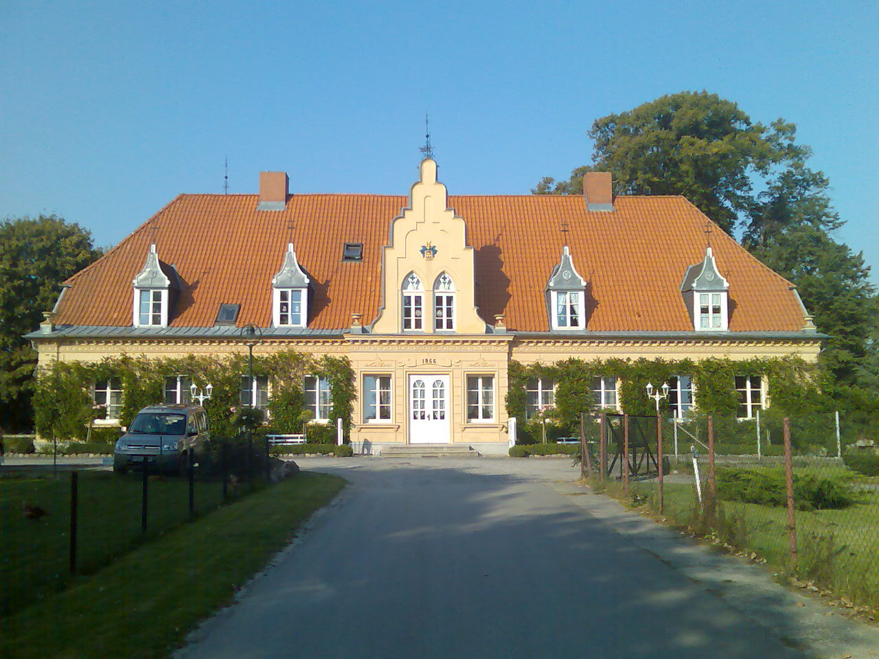 Gutshaus in Groß-Lüdershagen (Gemeinde Wendorf)